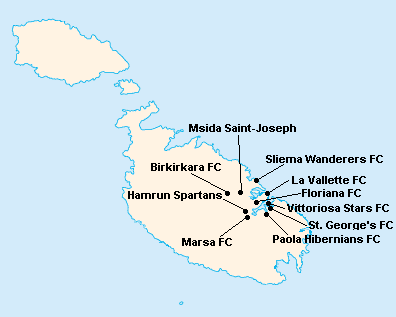 Répartition des clubs en First Division Maltaise 1977-1978.